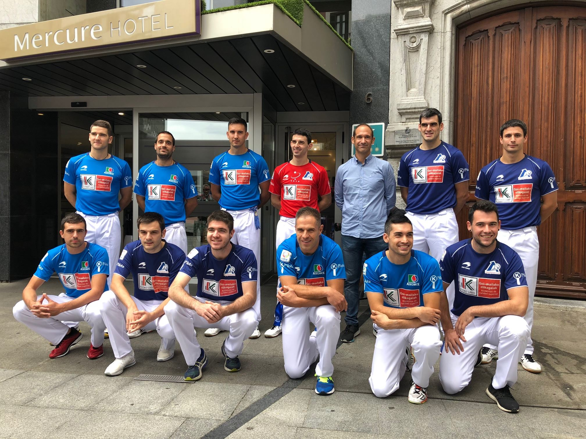 2018ko Lau eta Erdiko txapelketaren aurkezpenean pilotari guztiak